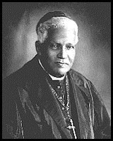 Dom Silvério Gomes Pimenta (1840—1922)